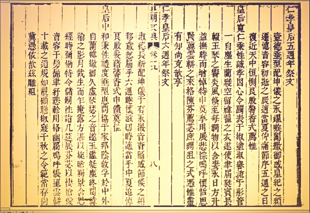 中文（台灣）: 皇朝文典十三卷之十九。仁孝皇后祭文。（圖片經過個人作變色處理）